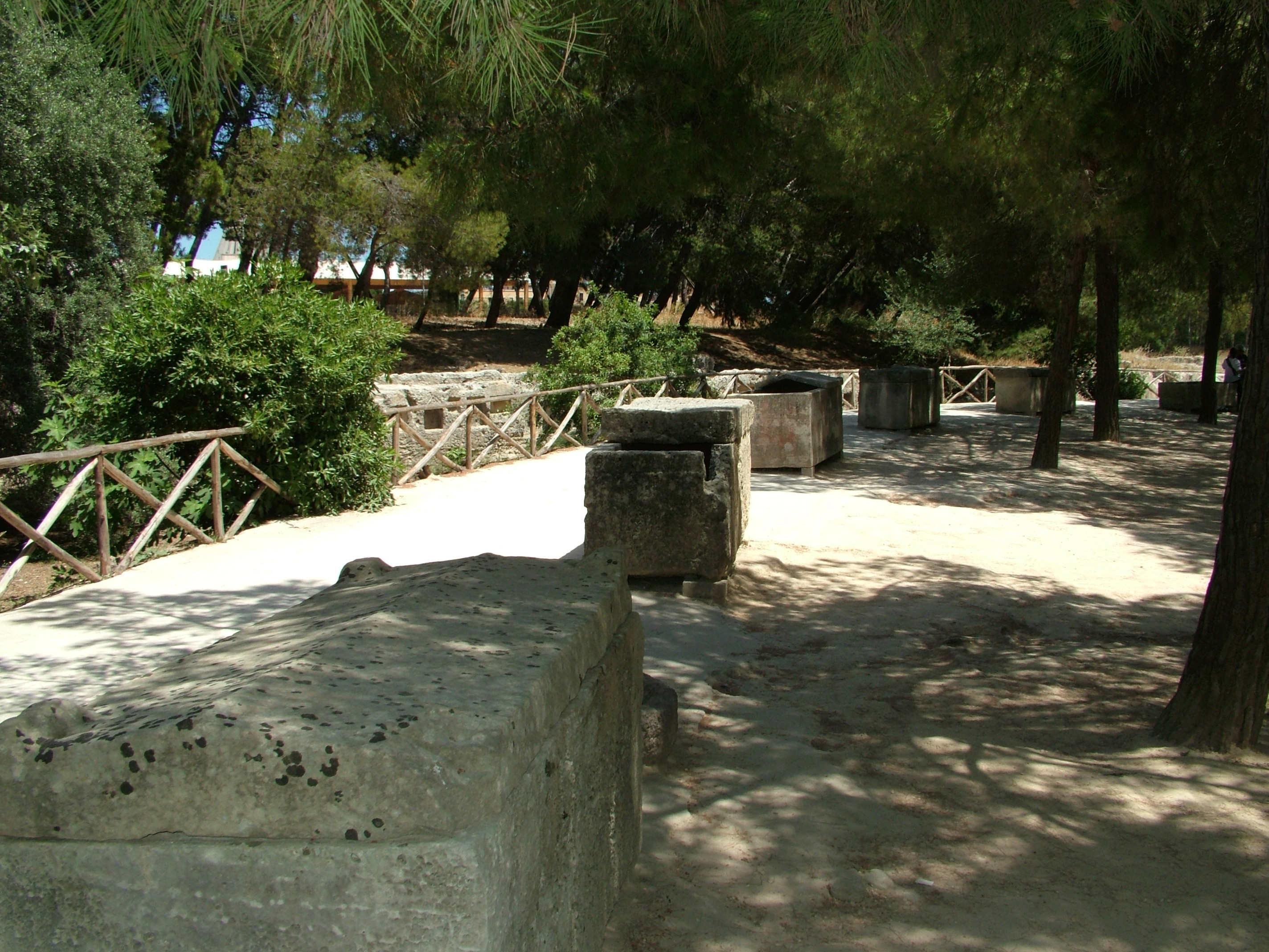 Siracusa, Italia, Sakrophage auf dem Weg zum Amphitheater im Parco Archeologico della Neapoli